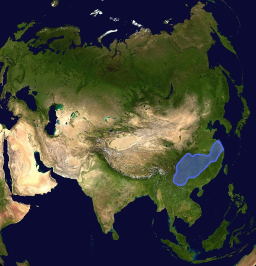 Localizzazione del cratone dello Yangtse (o della Cina Meridionale)